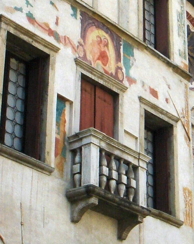 Serravalle (TV): Casa Bernardini, particolare della facciata con affrescata "Madonna con Bambino".